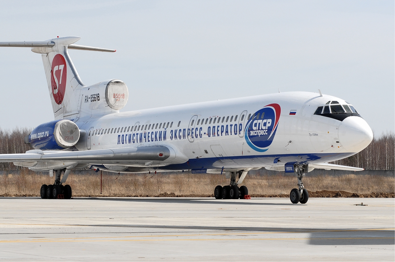 S7 Tupolev Tu-154M